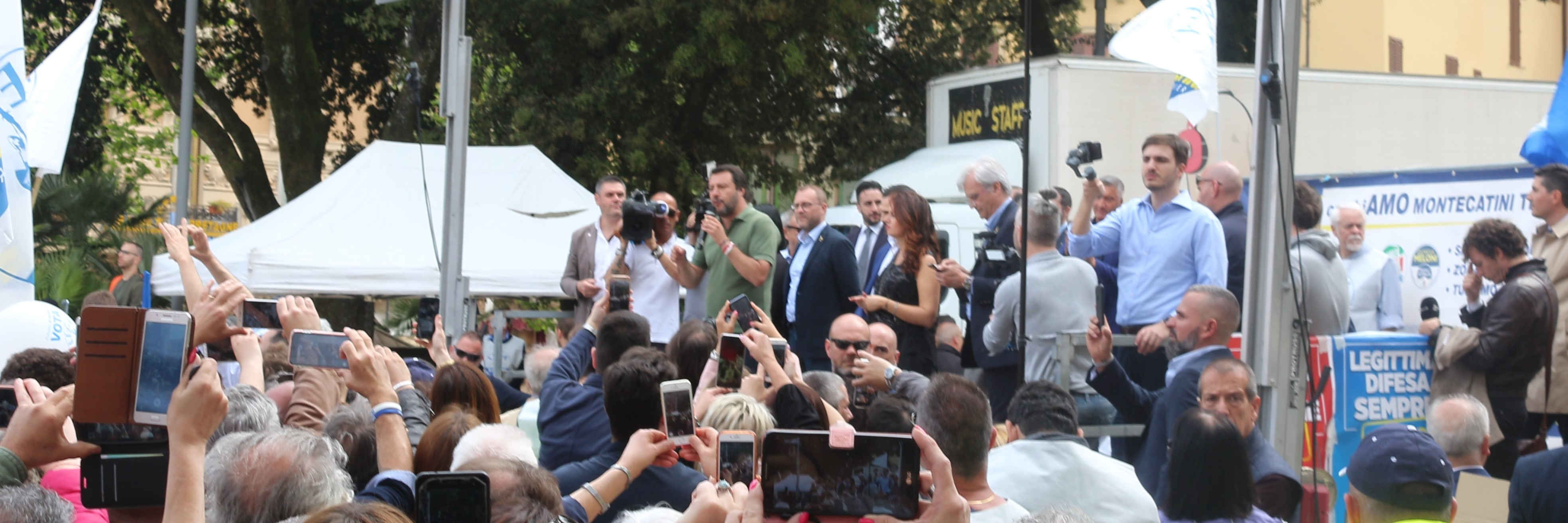 Comitato elettorale della Lega davanti alla Basilica di Montecatini Terme per le elezioni comunale ed europee di maggio 2019, con Matteo Salvini, Susanna Ceccardi (candidata nella circoscrizione Italia Centrale) e il candidato sindaco locale Luca Baroncini